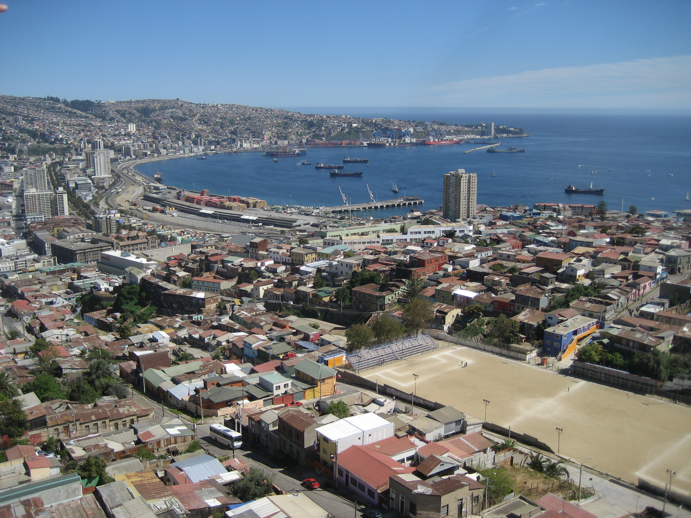 bahia de valparaiso